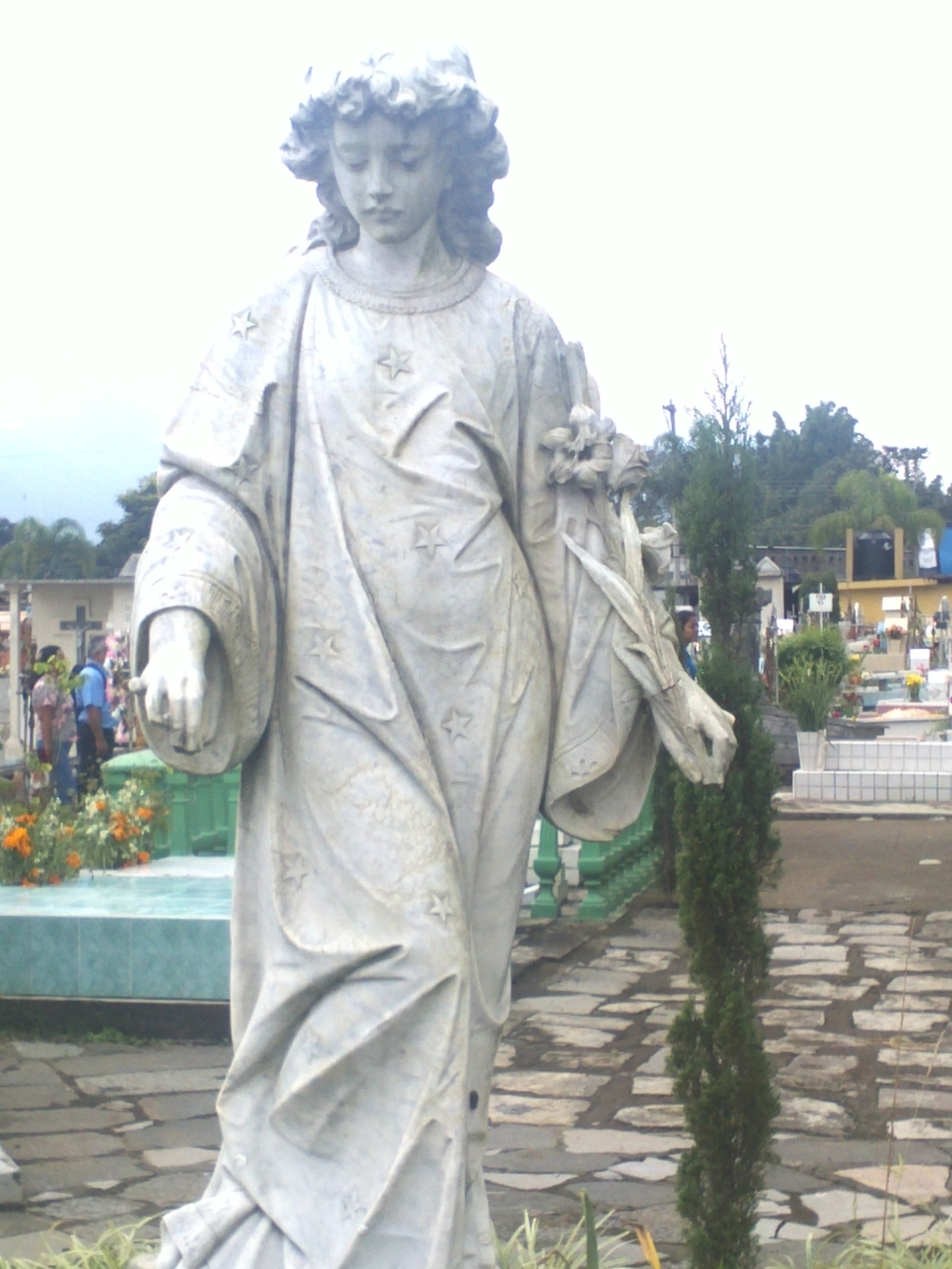 Angel del Panteón de Orizaba